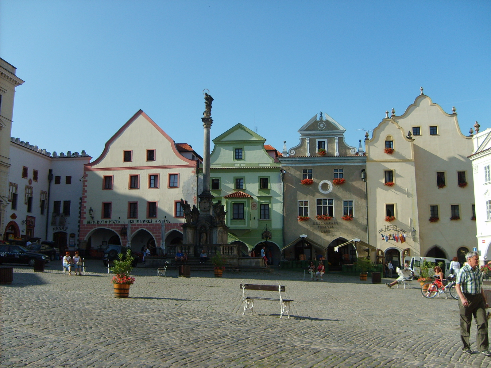 Morový sloup na náměstí Svornosti.